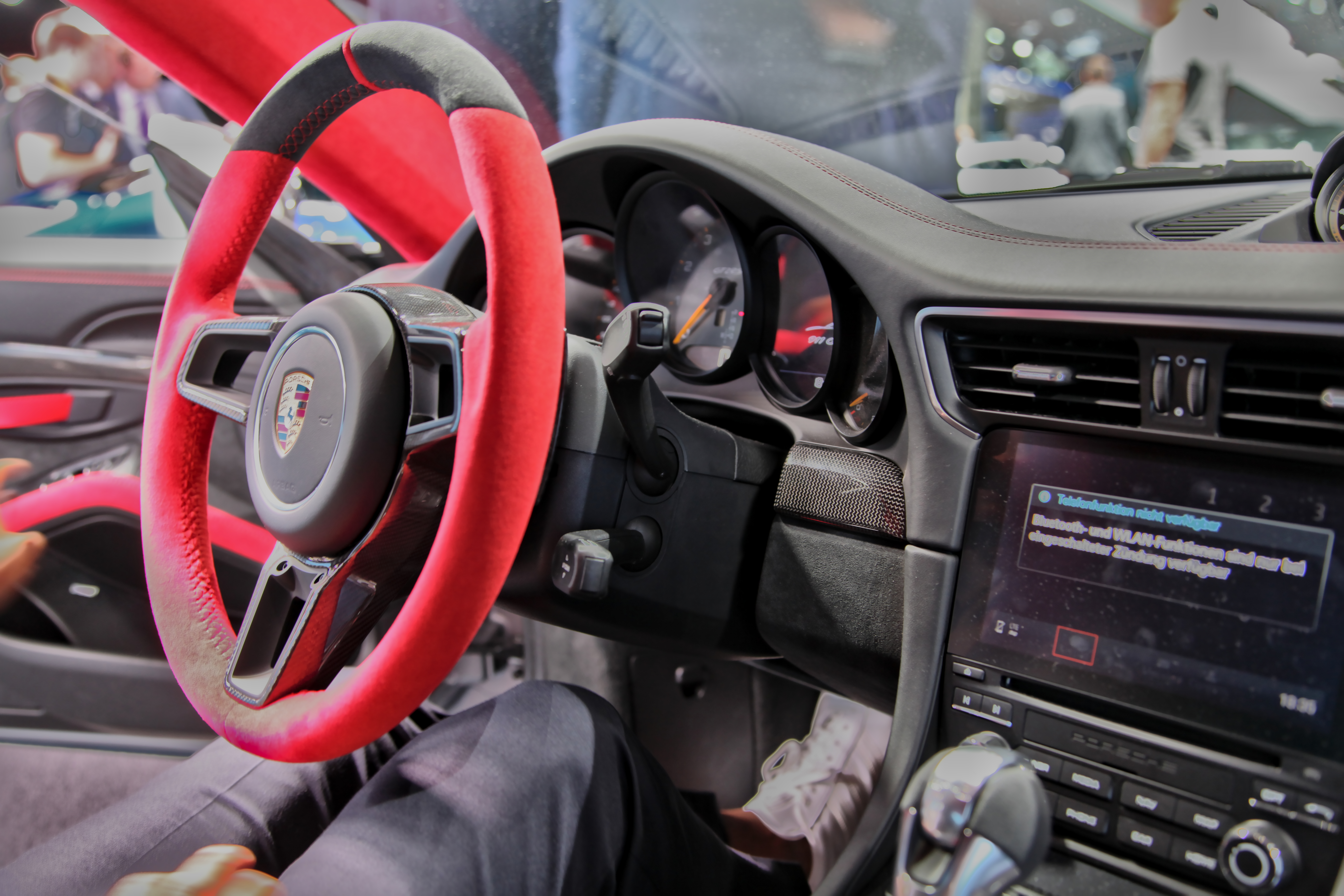 Porsche 911 GT2 RS Cockpit